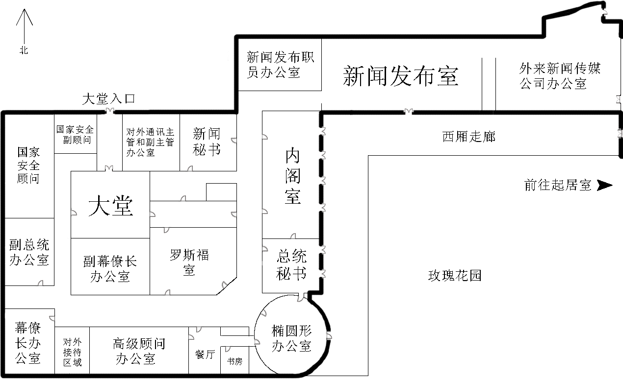 中文（中国大陆）: 白宫西厢办公室一楼各办公室位置分布图